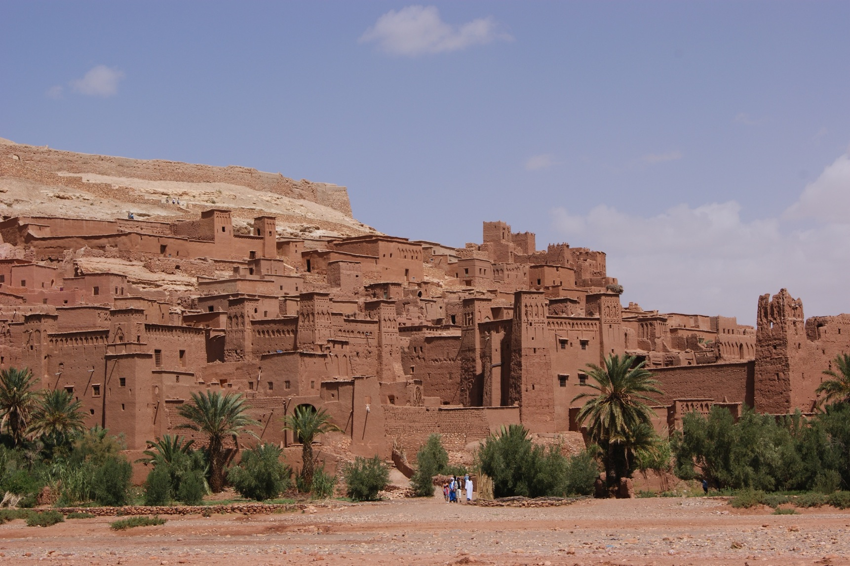 Ait Benhaddou